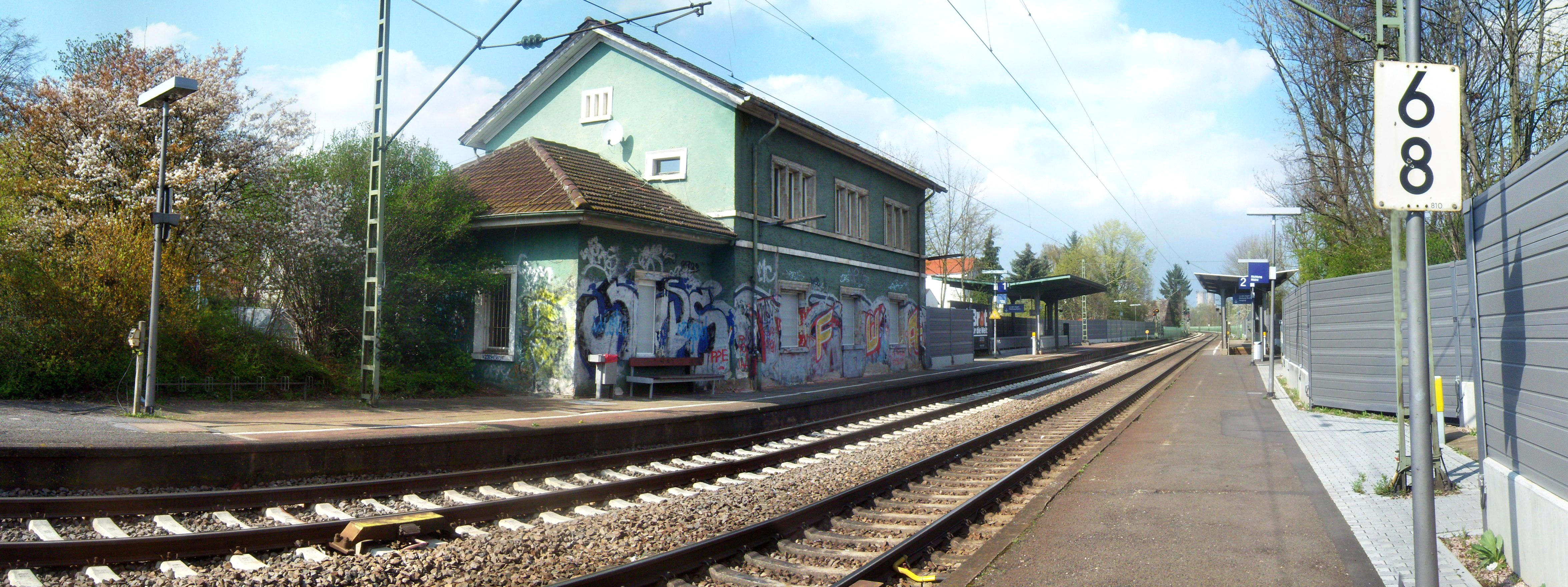 Der Mainz-Laubenheimer Bahnhof auf der Bahnstrecke Mainz-Ludwigshafen in Rheinland-Pfalz